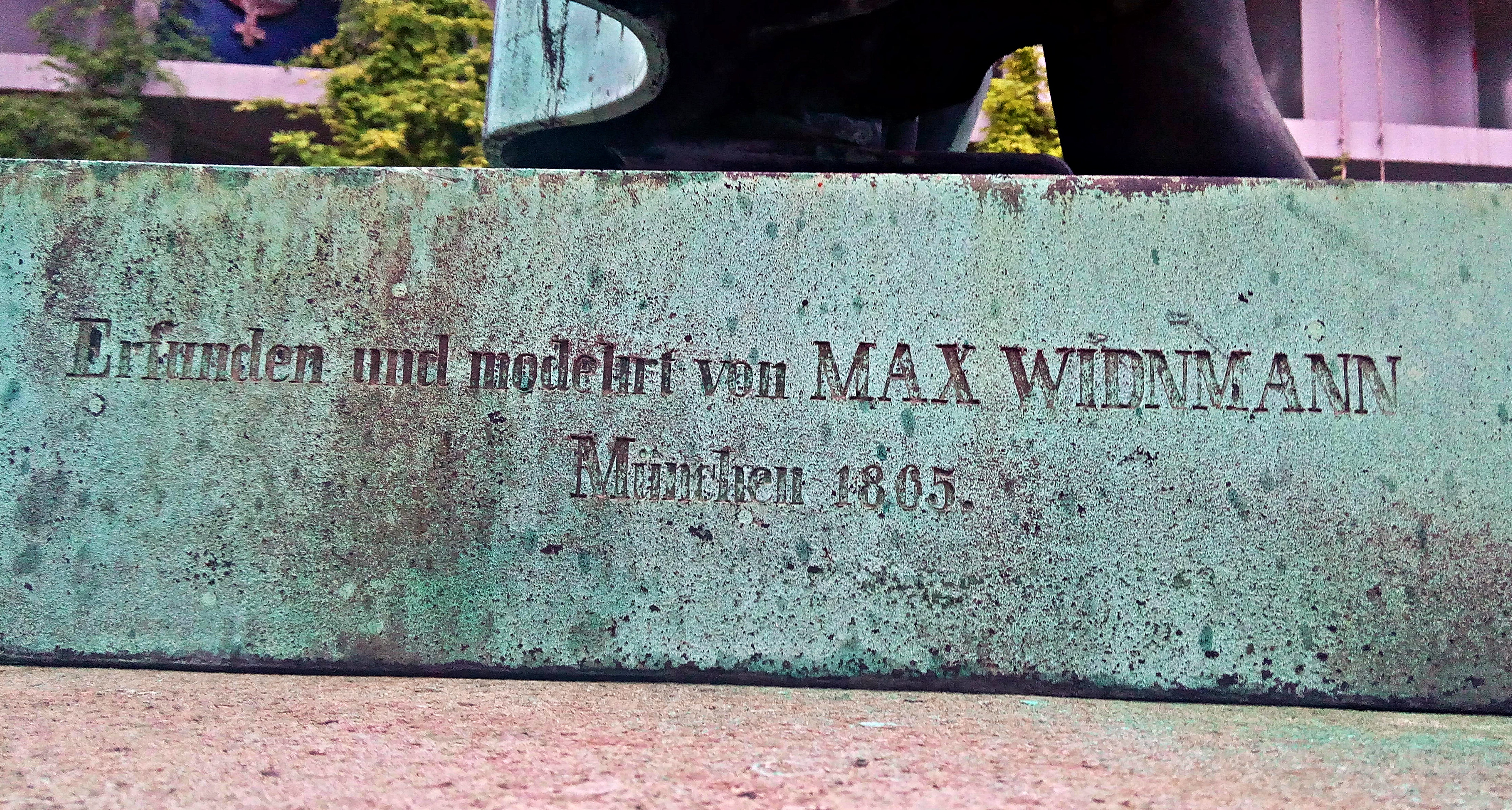 Widnmann-Signatur auf der Dalberg Statue in Mannheim